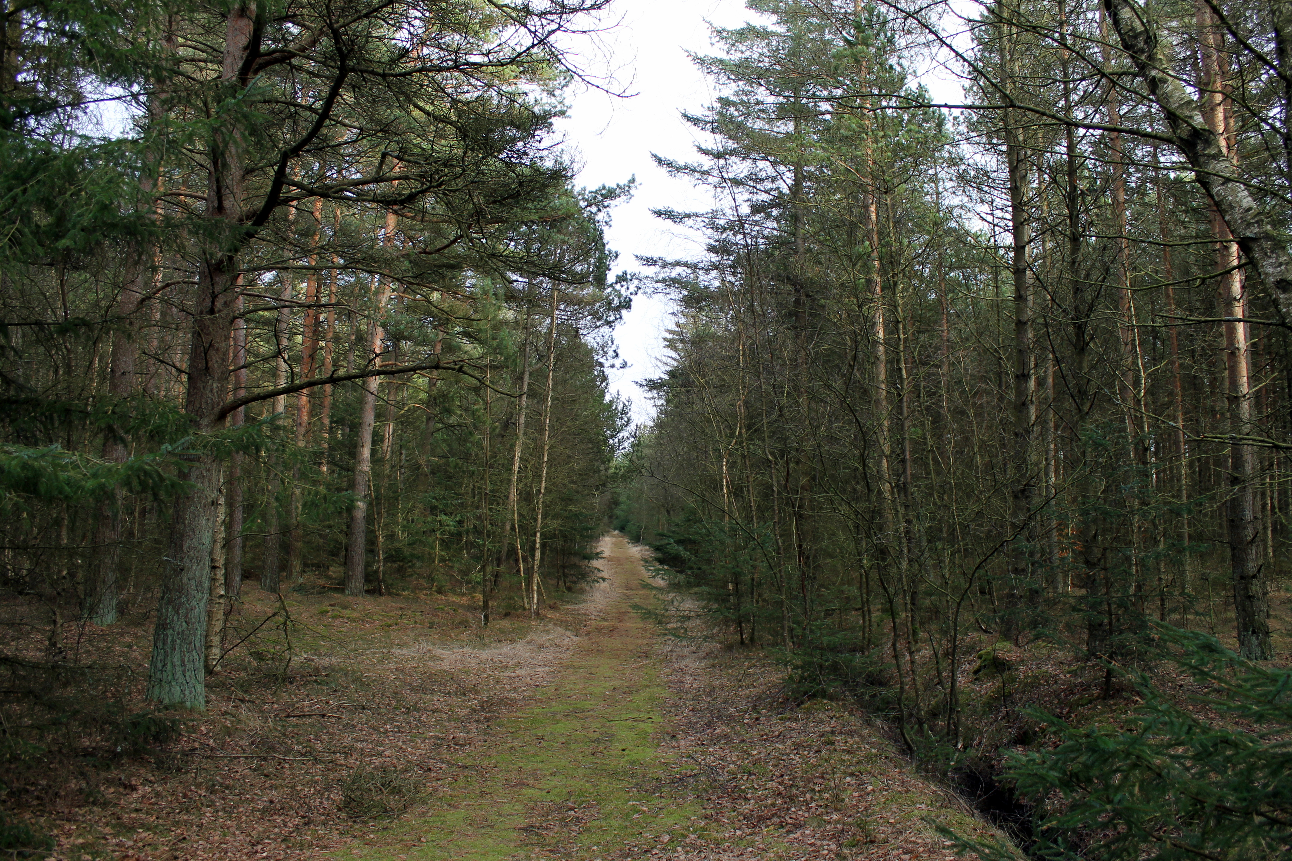 Uggerby Klitplantage. EU-habitatområde nr. 5